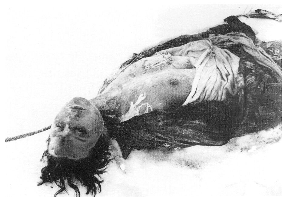 Фото казнённой Зои Космодемьянской